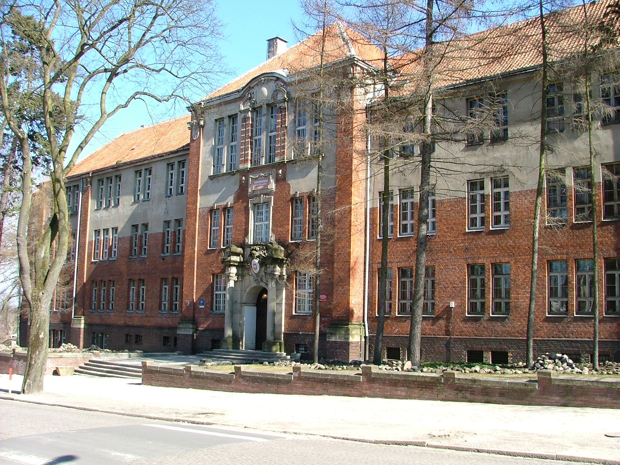 Ostróda, ul. Drwęcka 2 - dawne gimnazjum, obecnie Liceum Ogólnokształcące nr 1 im. Jana Bażyńskiego